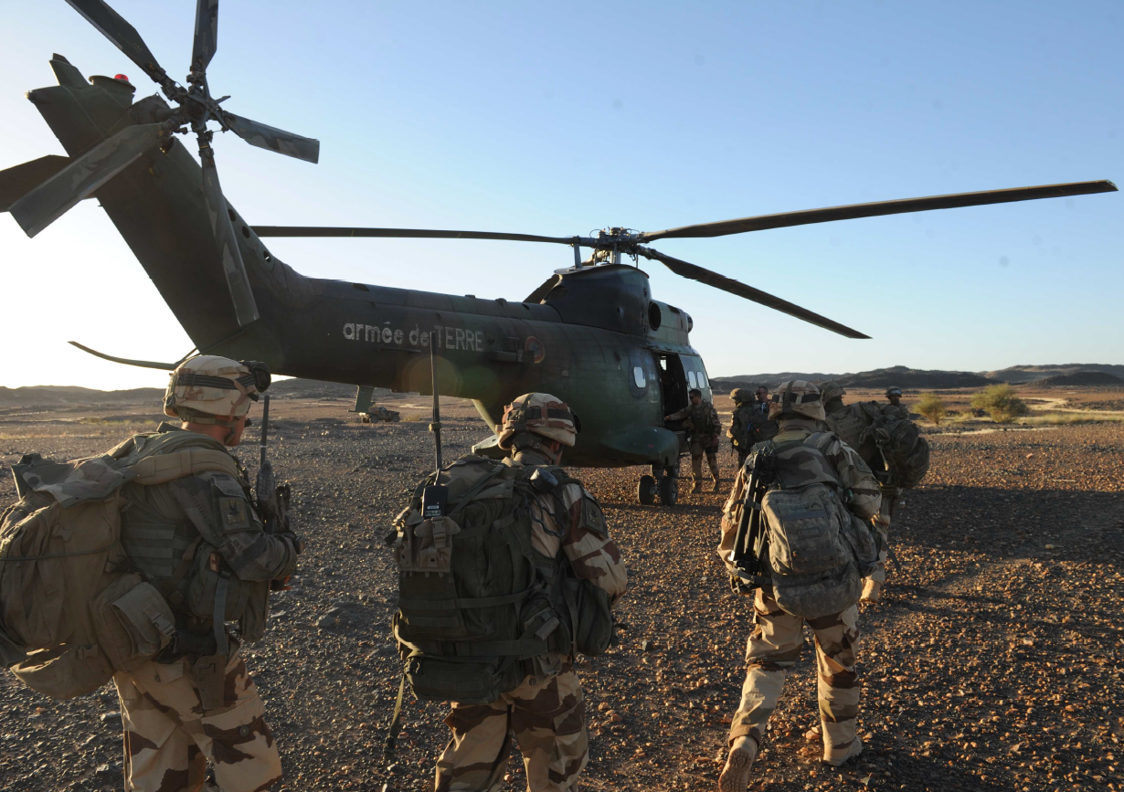 Les GCP du 35e RAP rentre de mission